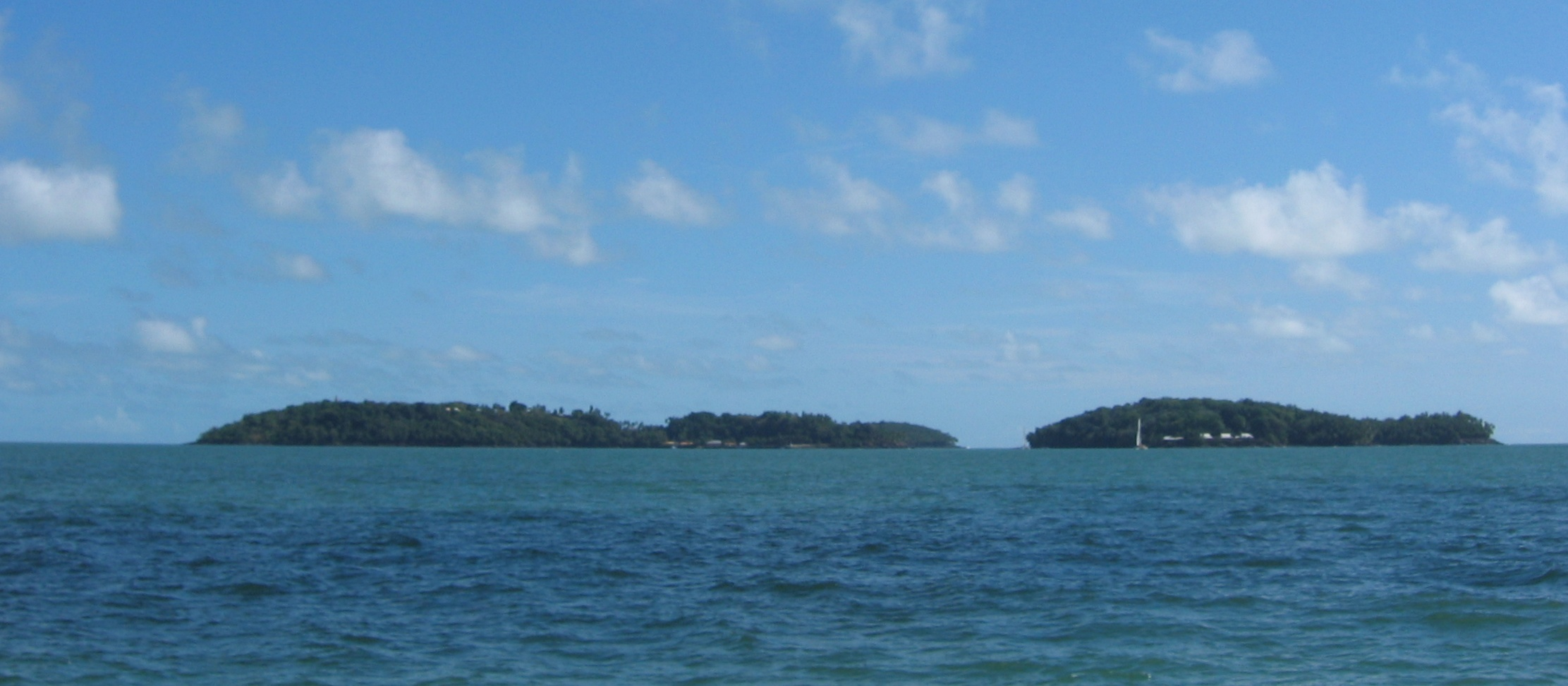 Îles du Salut (Guyane)